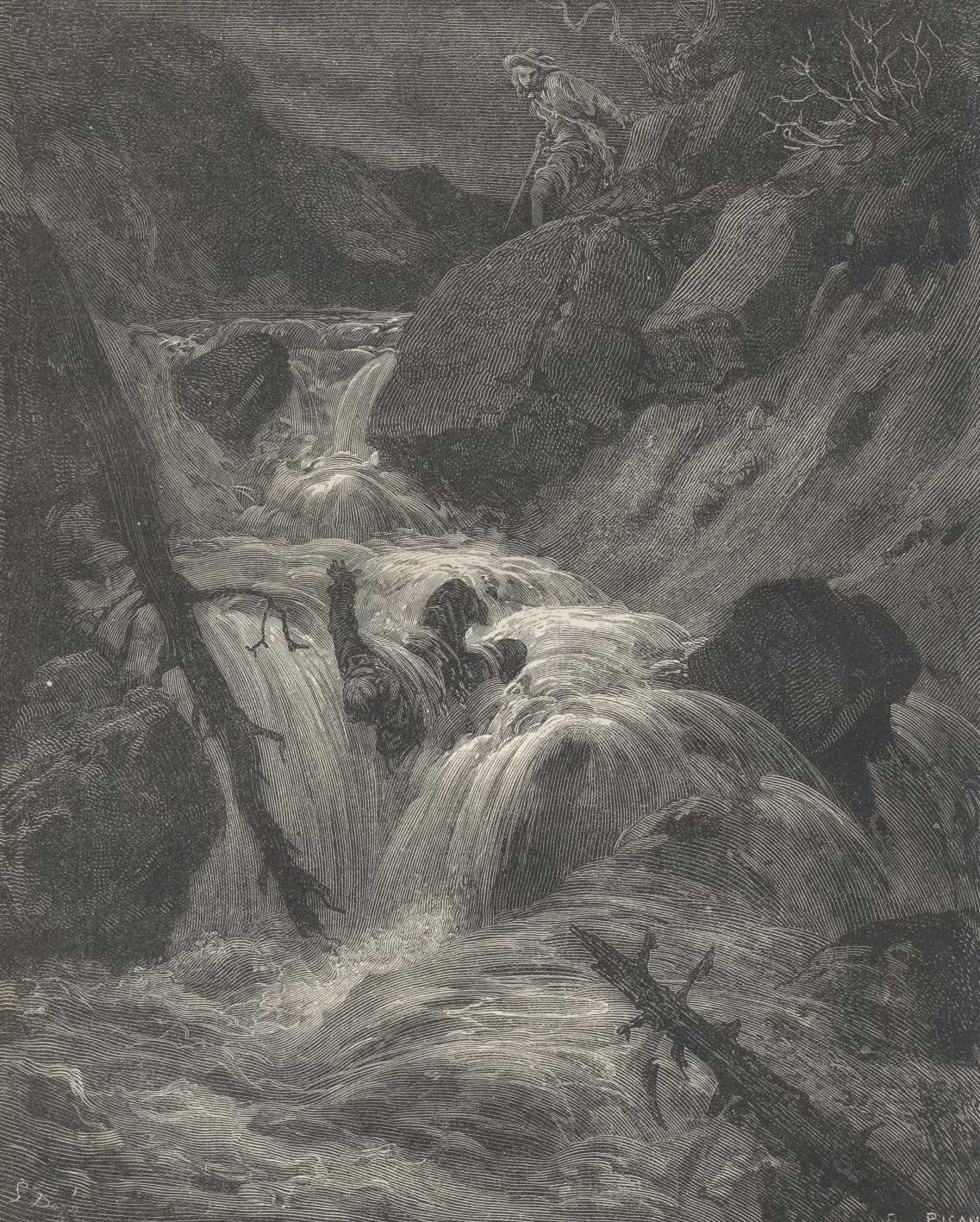 Ilustração de Gustave Doré para a edição de 1863 de "Dom Quixote" de Miguel de Cervantes